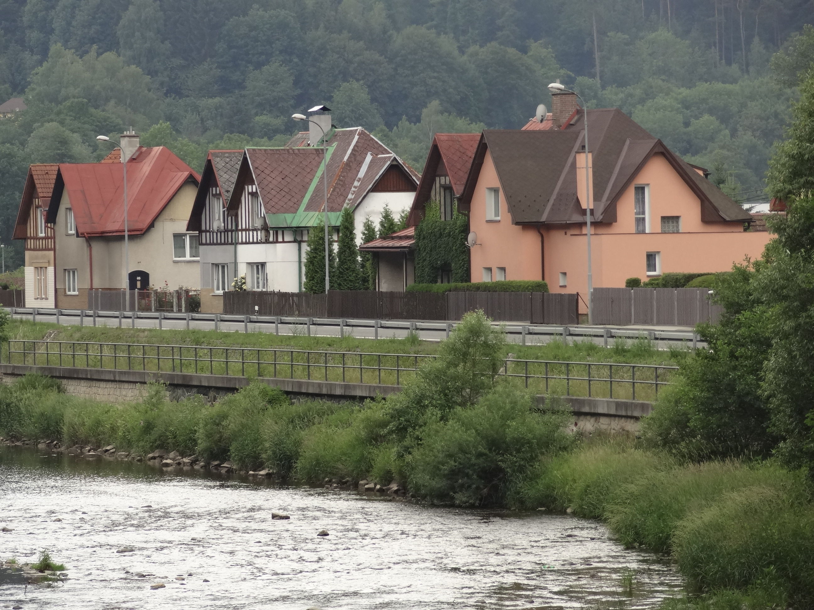 Líšný 1.díl - obytná kolonie čp. 91-96